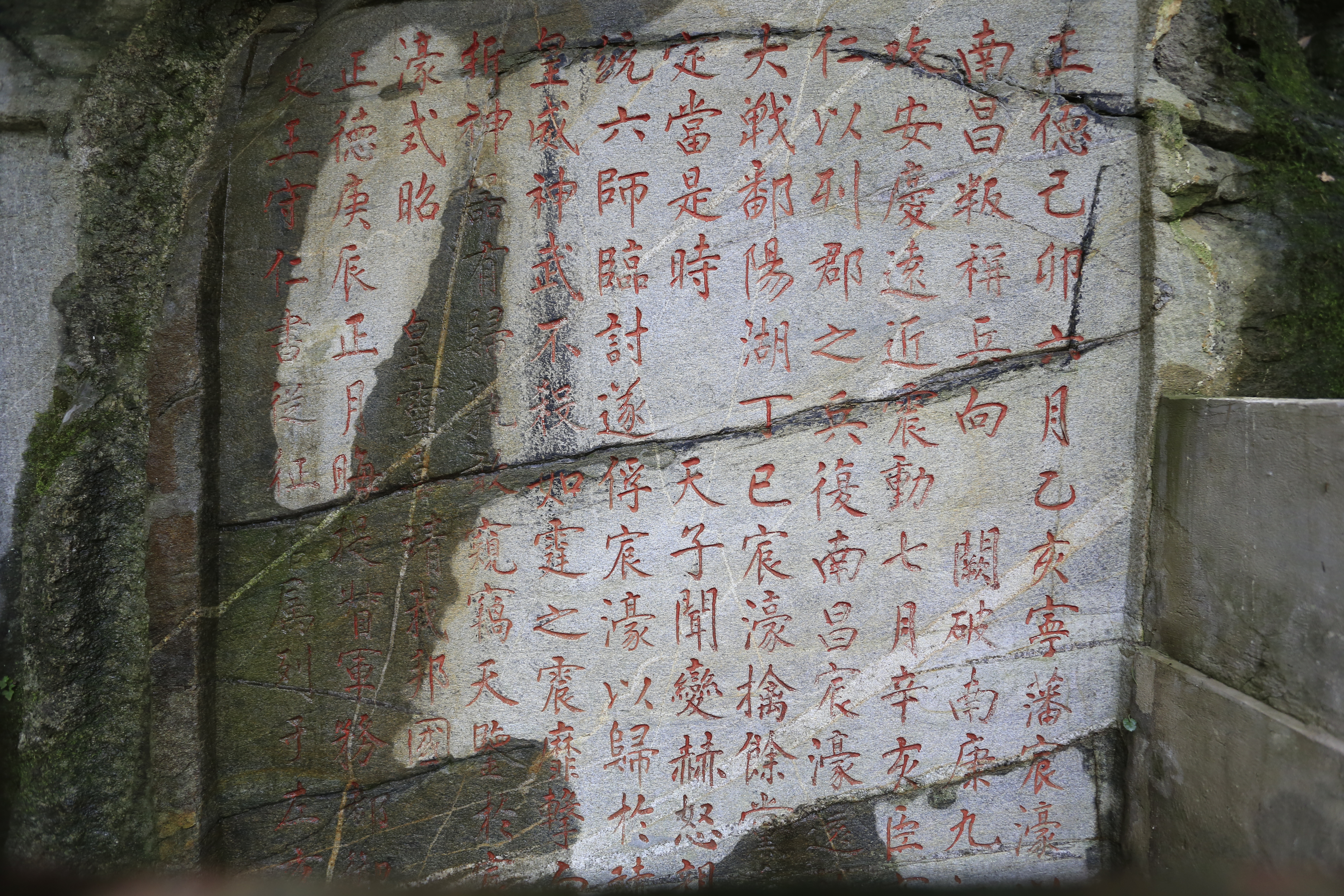 秀峰摩崖 王守仁《纪功碑》